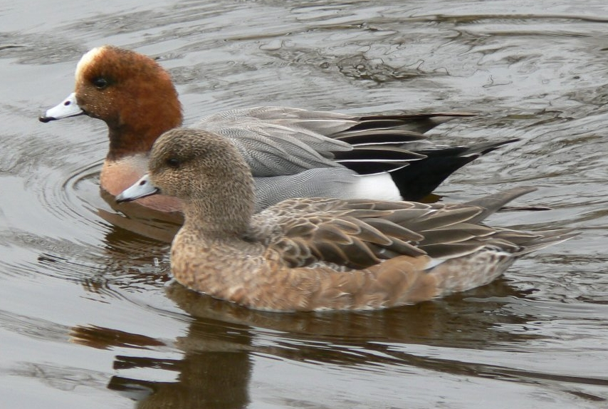 仲がよさそうですね。 ヒドリガモ（Anas penelope）。